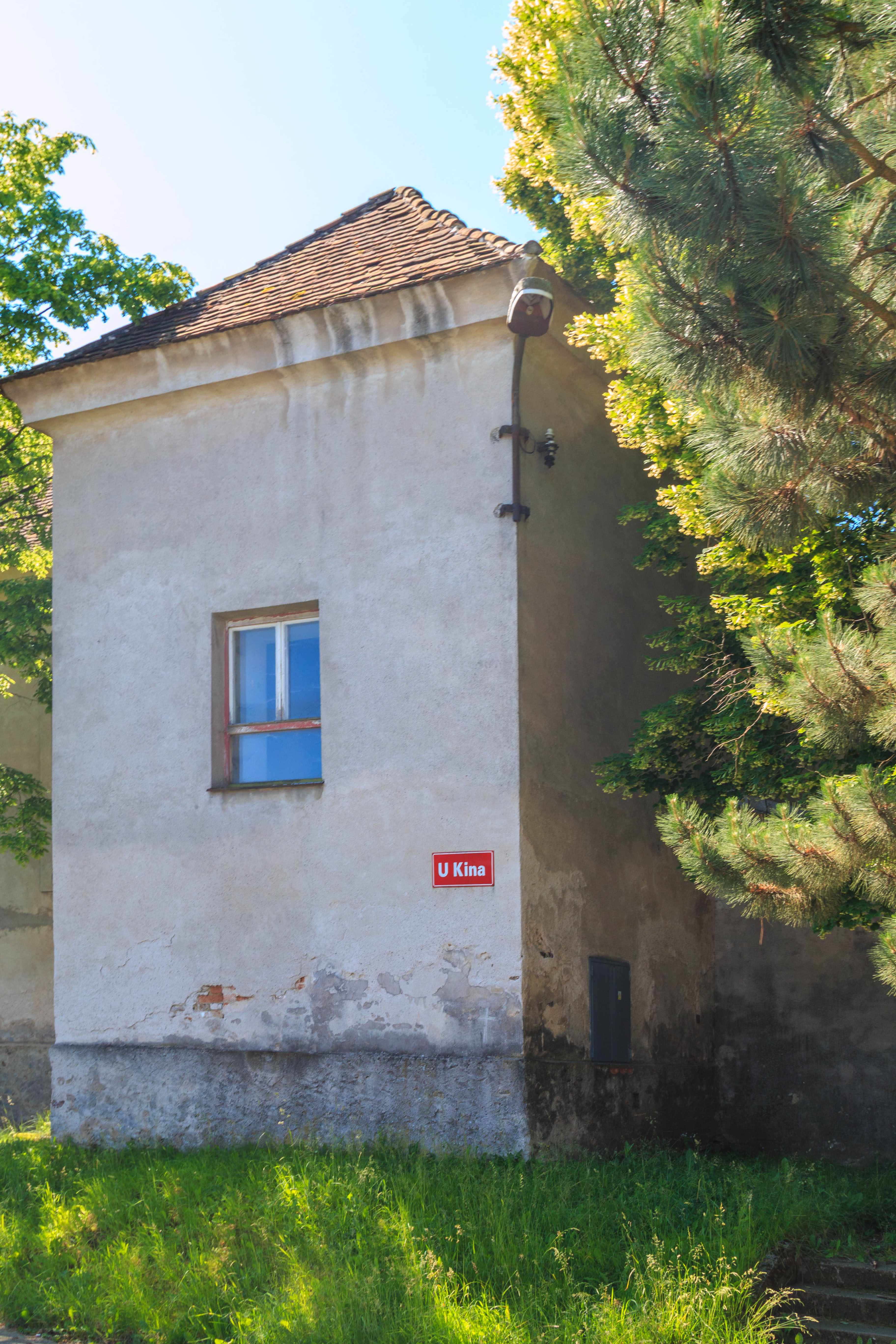 Synagoga v Habrech Project: Židovské památky.